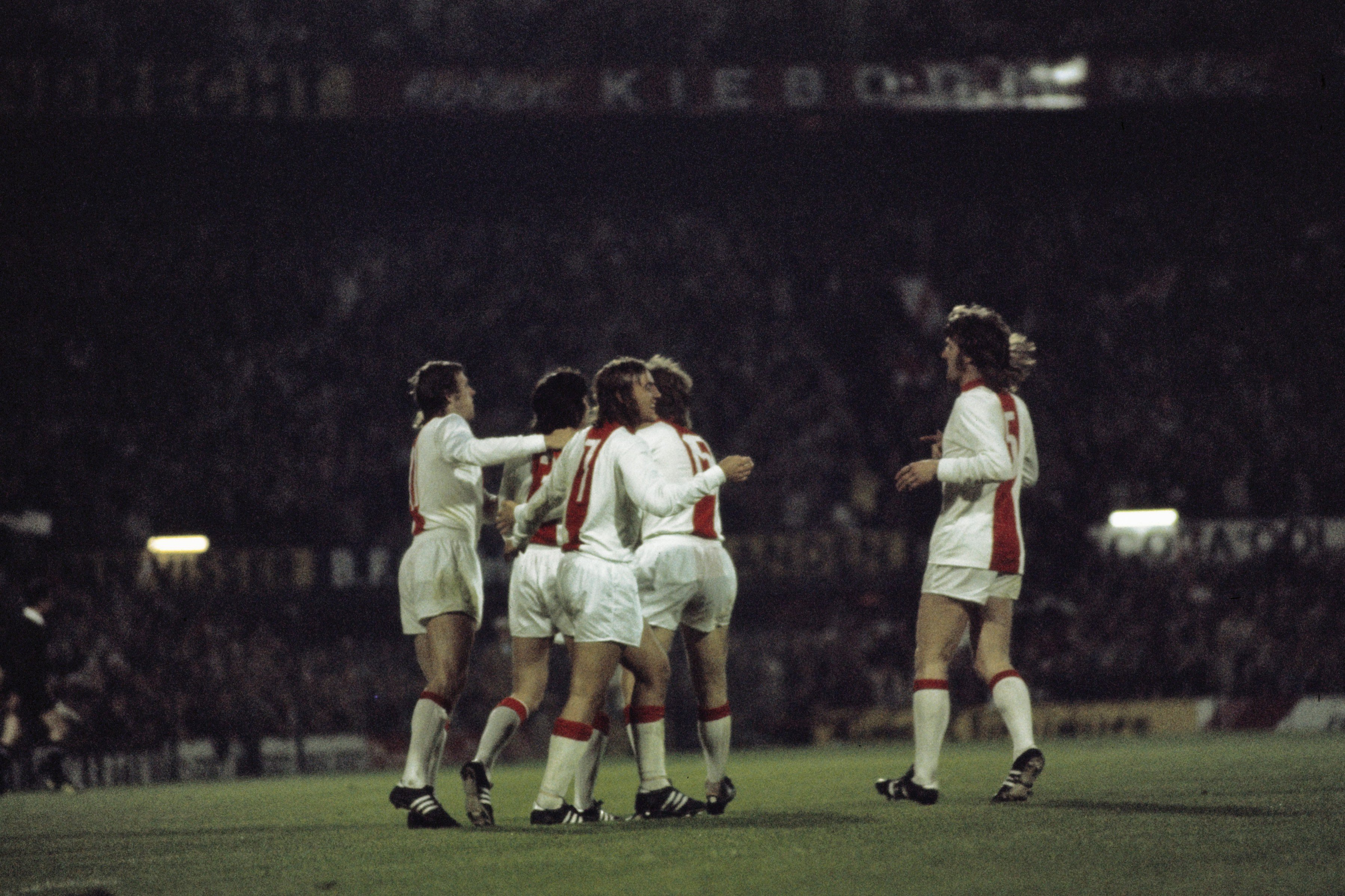 Finale Europacup I in Feijenoord stadion: Ajax tegen Inter Milaan 2-0; vreugde Ajax spelers na doelpunt